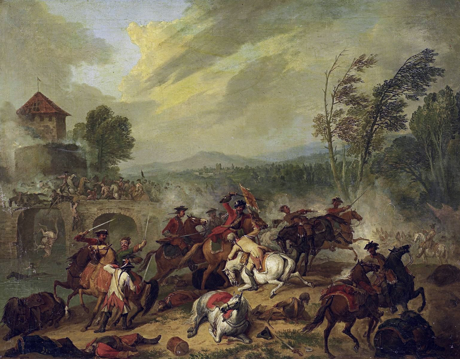 Reiterschlacht an der Brücke. Signiert unten rechts: J (lig) P Verdussen. Öl auf Leinwand auf Sperrholz gezogen. 62 x 79 cm. Provenienz: Ostwestfälischer Adelsbesitz.